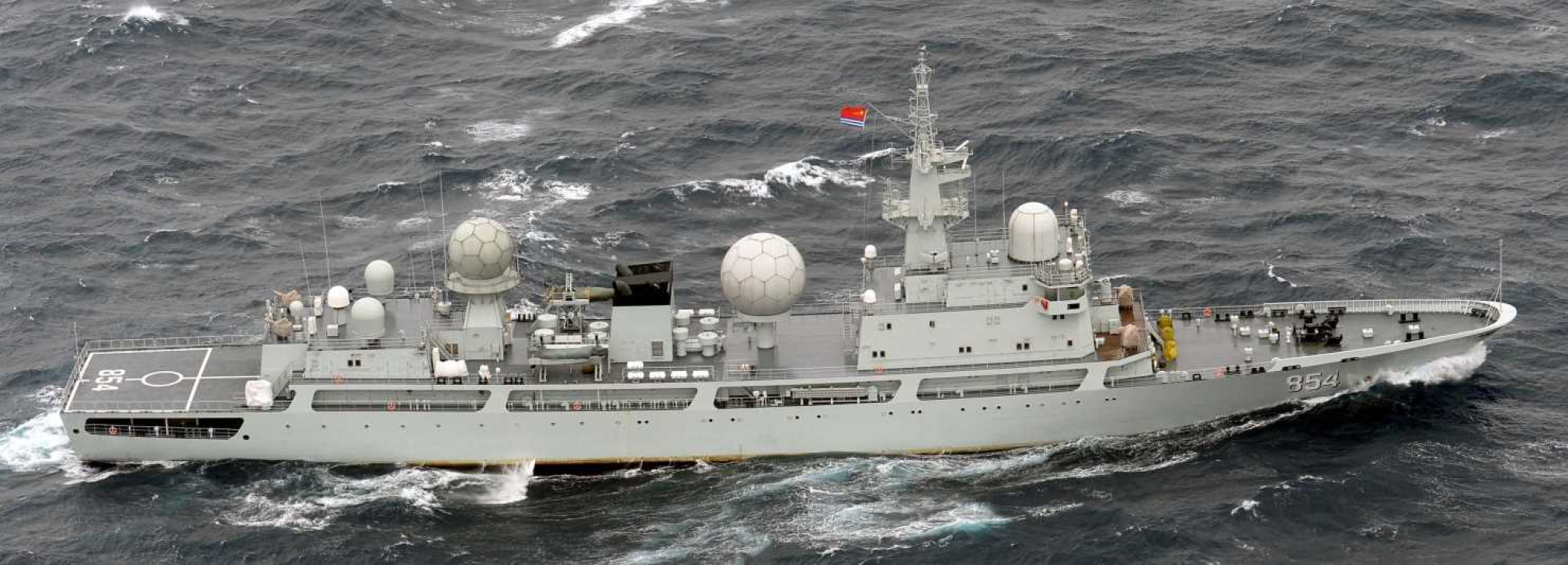 ２月１６日（火）午後５時半頃、第５航空群所属「Ｐ－３Ｃ」（那覇）、第１２護衛隊所属「とね」（呉）及び呉地方隊所属「げんかい」（佐伯）が、種子島の東北東約８５ｋｍの海域を太平洋から東シナ海に向けて西進する中国海軍ルフ級駆逐艦１隻、ジャンカイII級フリゲート１隻、ドンディアオ級情報収集艦１隻及びフーチン級補給艦１隻の合計４隻を確認した。その後、当該艦艇が、大隅海峡を西航したことを確認した。なお、当該艦艇は、１月２７日（水）に対馬海峡を北上、２月２日（火）に津軽海峡を東航したものと同一であり、ドンディアオ級情報収集艦については、２月４日（木）から８日（月）にかけて房総沖で往復航行していたものと同一である。